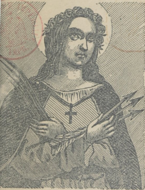 Monographie imprimée de Sainte Blandine